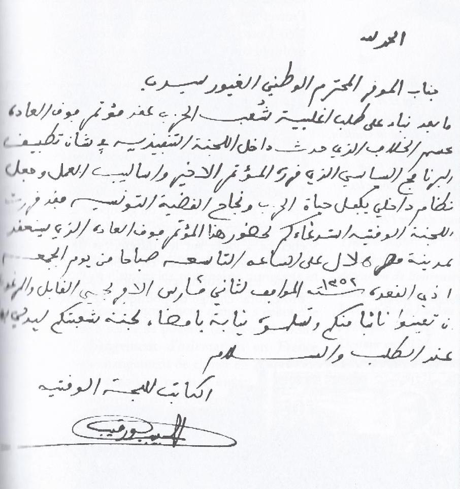 Convocation au congrès de ksar Hellal